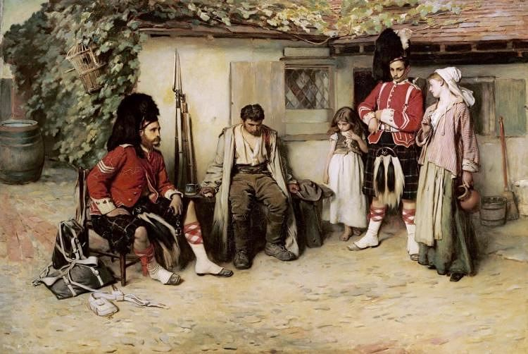 A Deserter